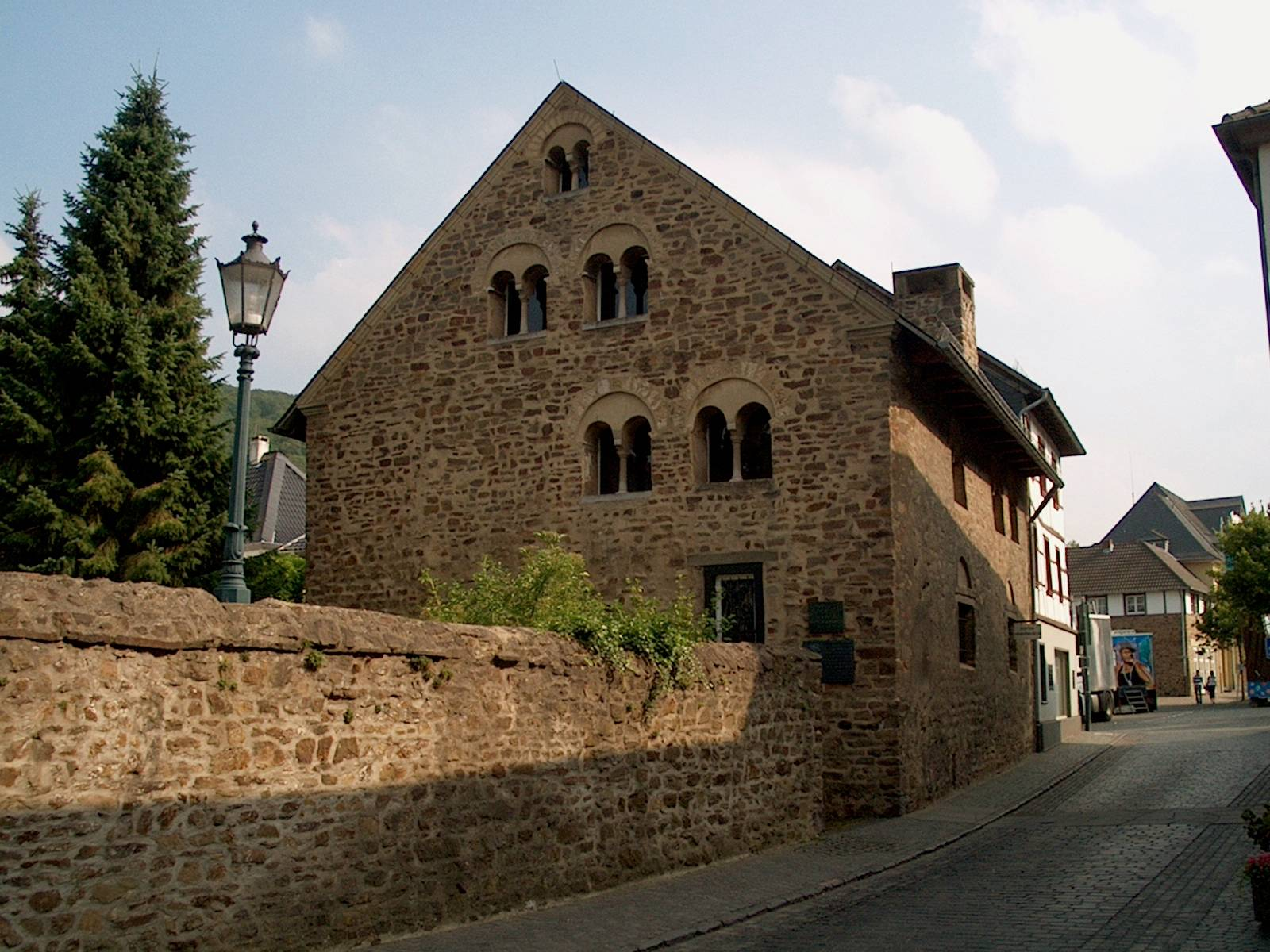 Bad Münstereifel- Romanisches Haus (von 1167), Langenhecke 6